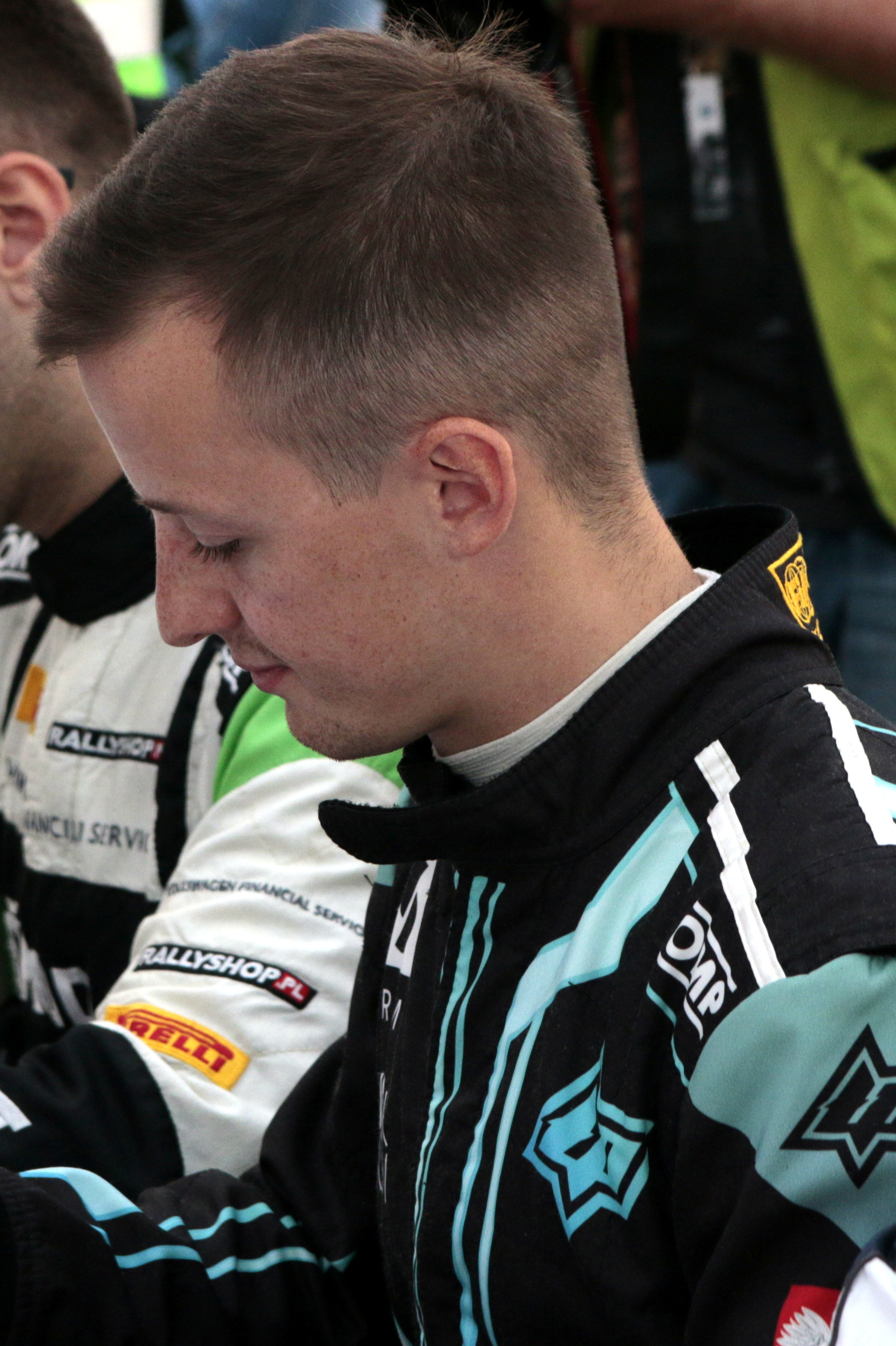 Rajd Polski 2018 - Łukasz Pieniążek